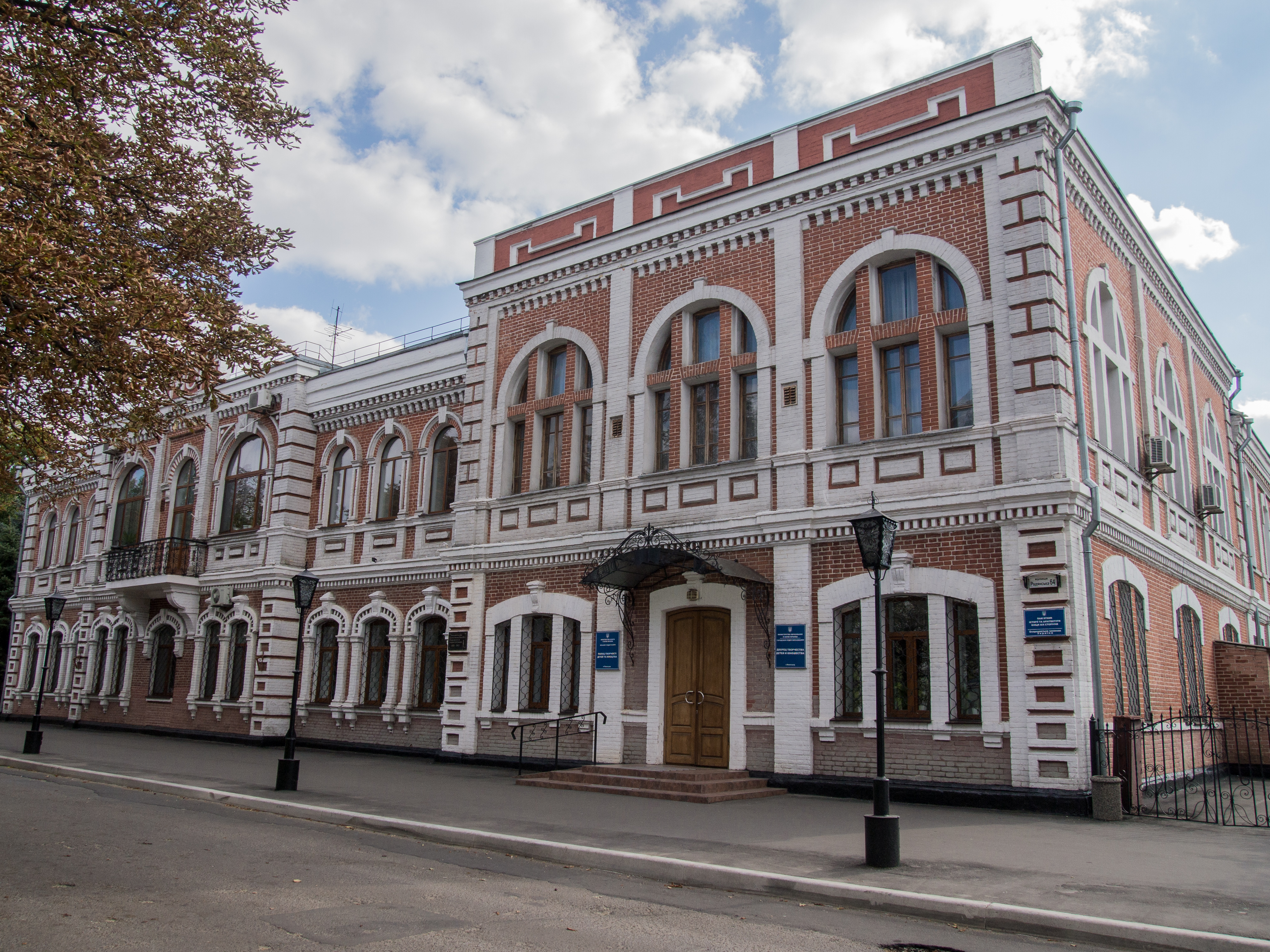 Жіноча гімназія, Павлоград, вул.Радянська, 64